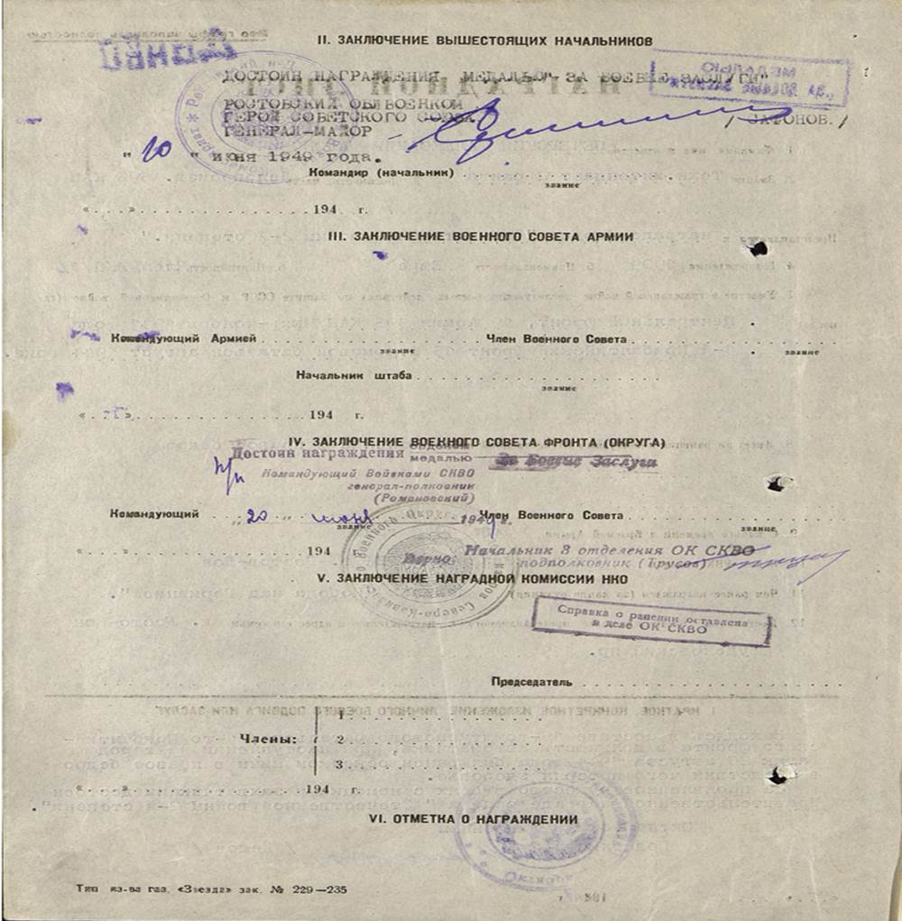 Решение об изменении награждения А. А. Печерского с ордена «Отечественная война II степени» на медаль «За боевые заслуги»